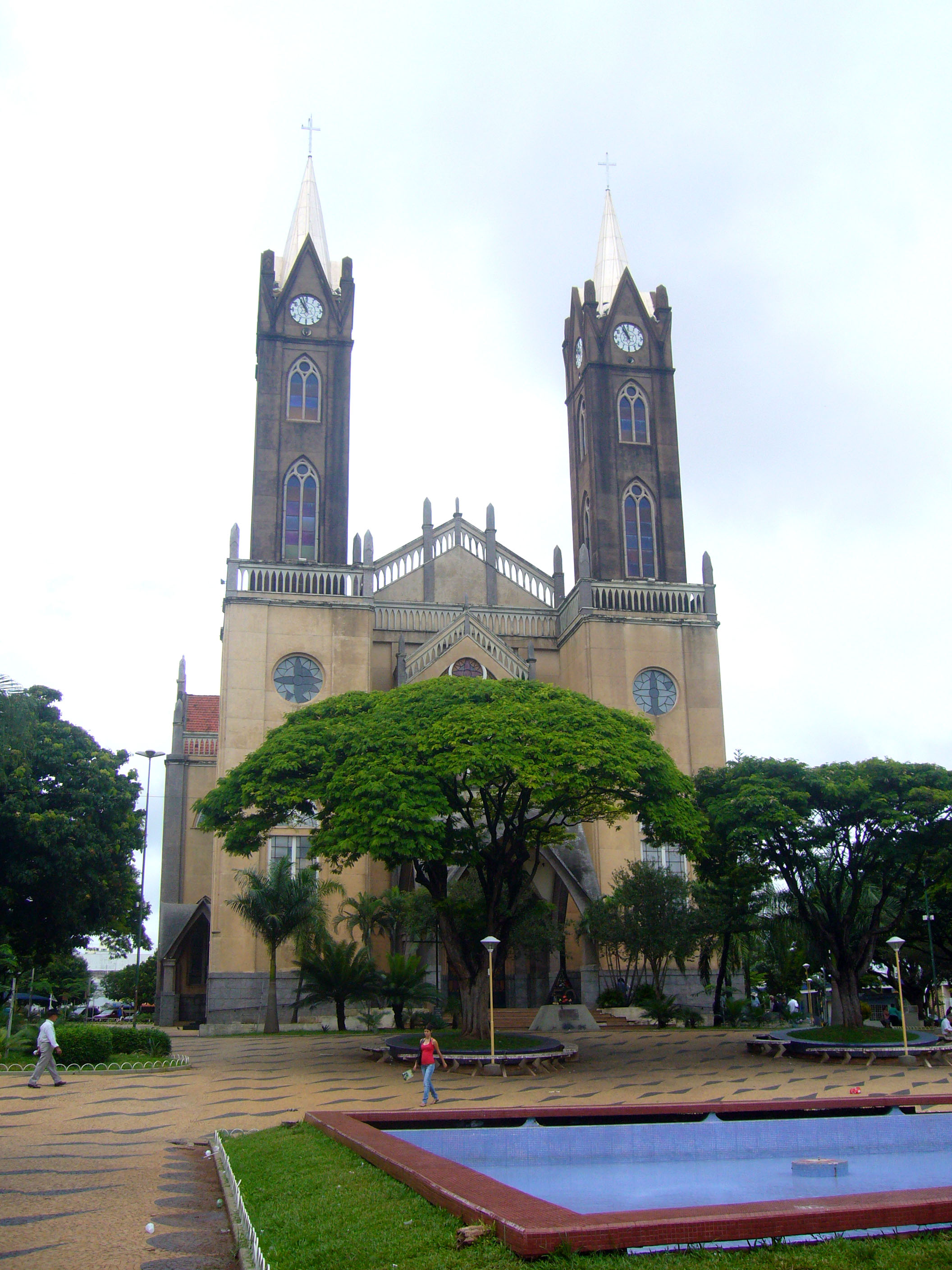 Igrja Matriz de Votuporanga - SP